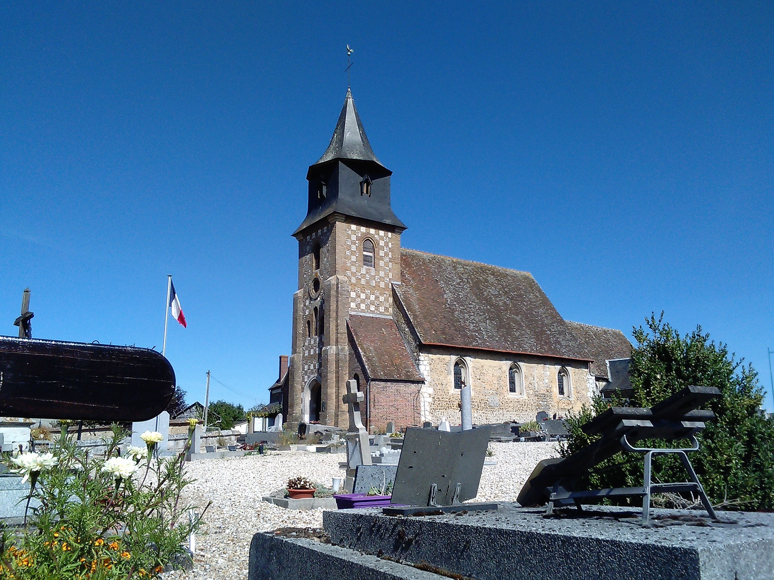 L'église Saint-Sulpice de Gravigny, Eure.